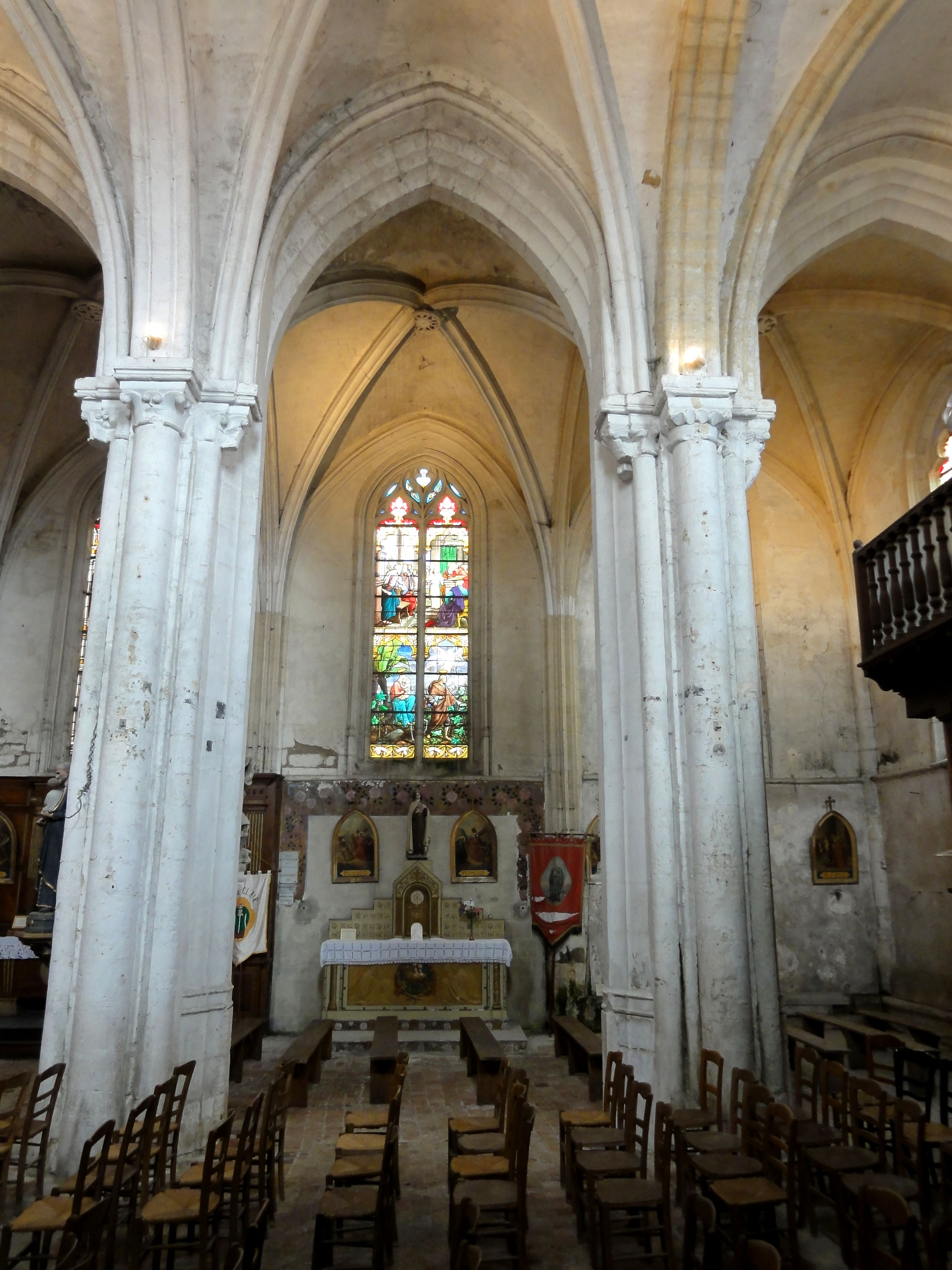 Nef, seconde grande arcade du sud.